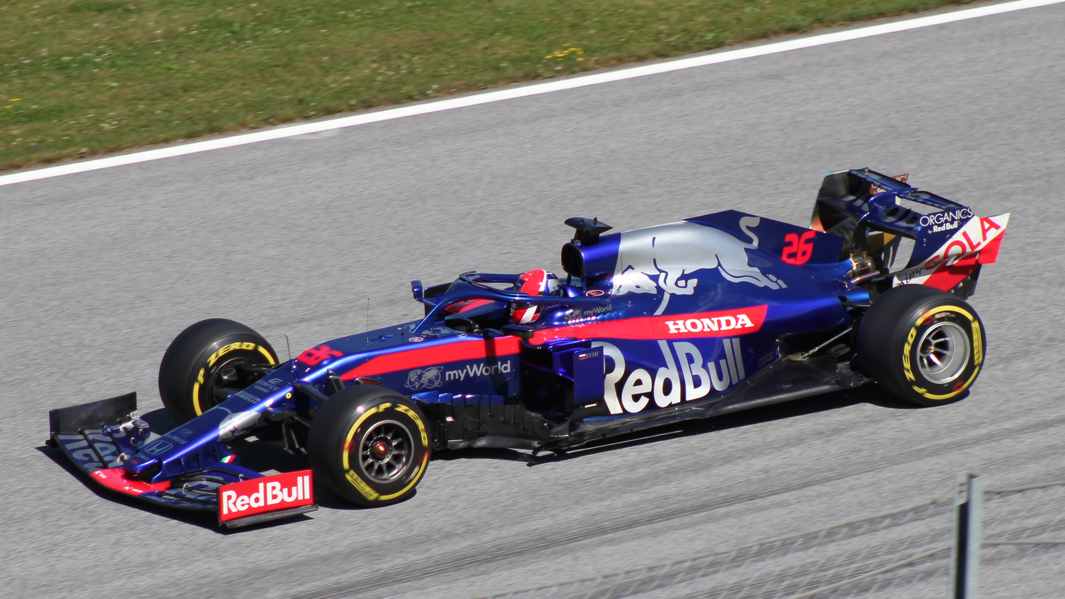 Kvyat beim Rennwochenende in Österreich 2019